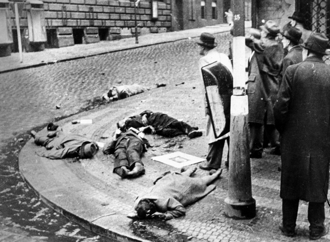 ČROZH